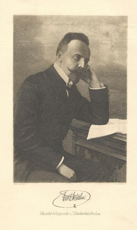 Porträt Ernst Zahn. Radierung von Johann Lindner mit faksimilierter Unterschrift des Porträtierten